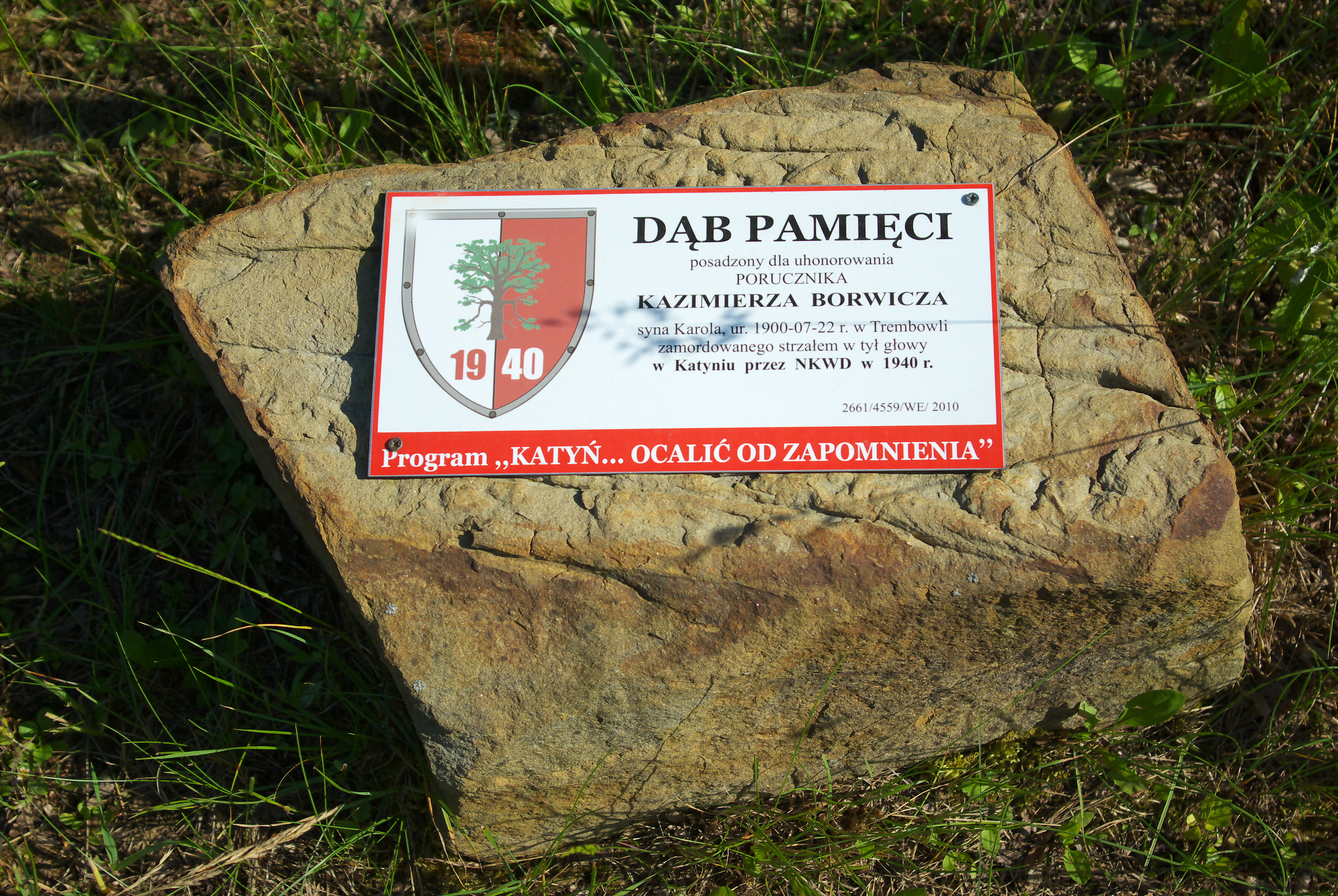 Kamień pamiątkowy w Falejówce przy Dębie Pamięci ofiary zbrodni katyńskiej; uhonorowany Kazimierz Borwicz